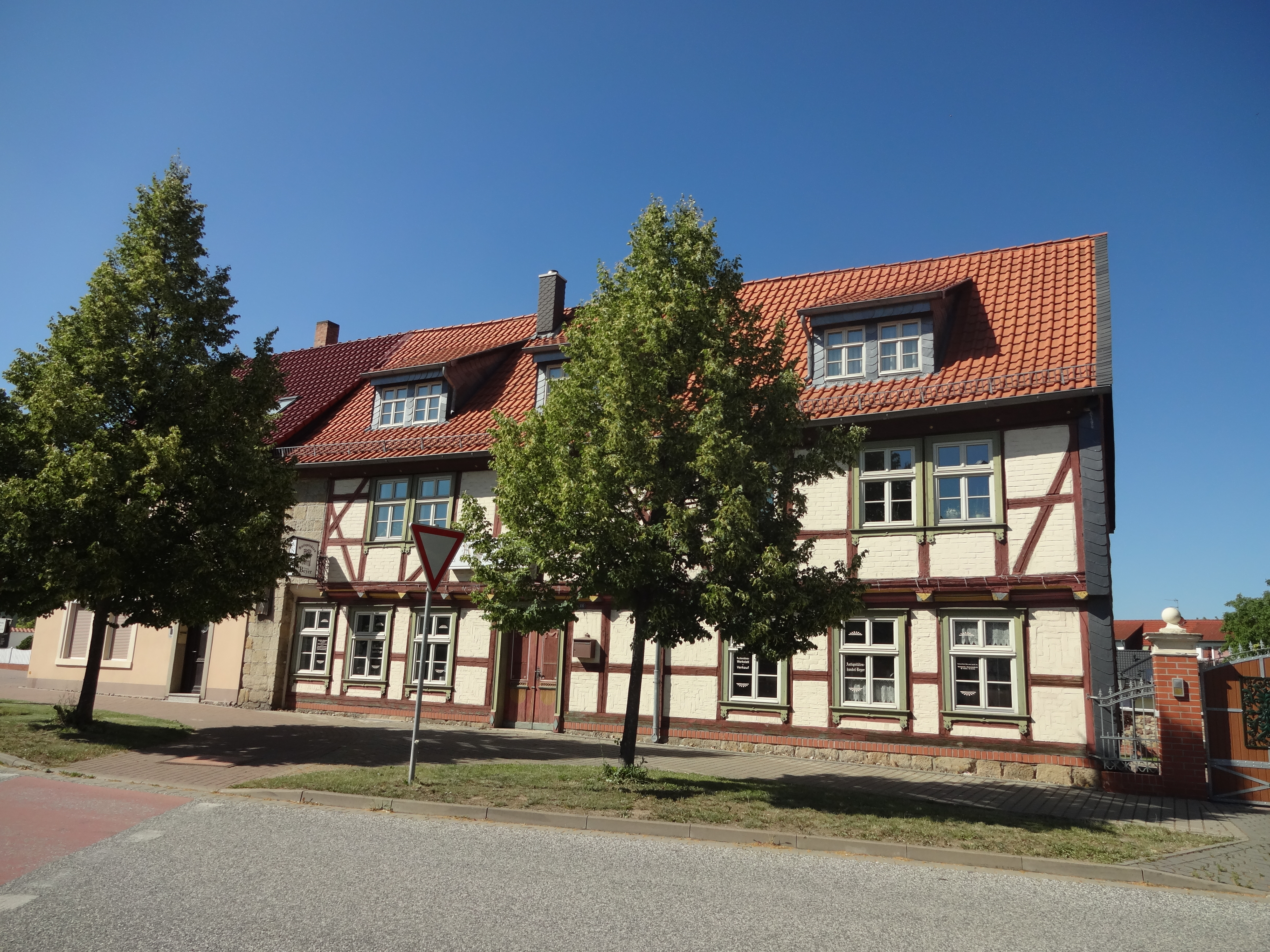 denkmalgeschütztes Fachwerkhaus in der Halberstädter Straße 10 in Harsleben